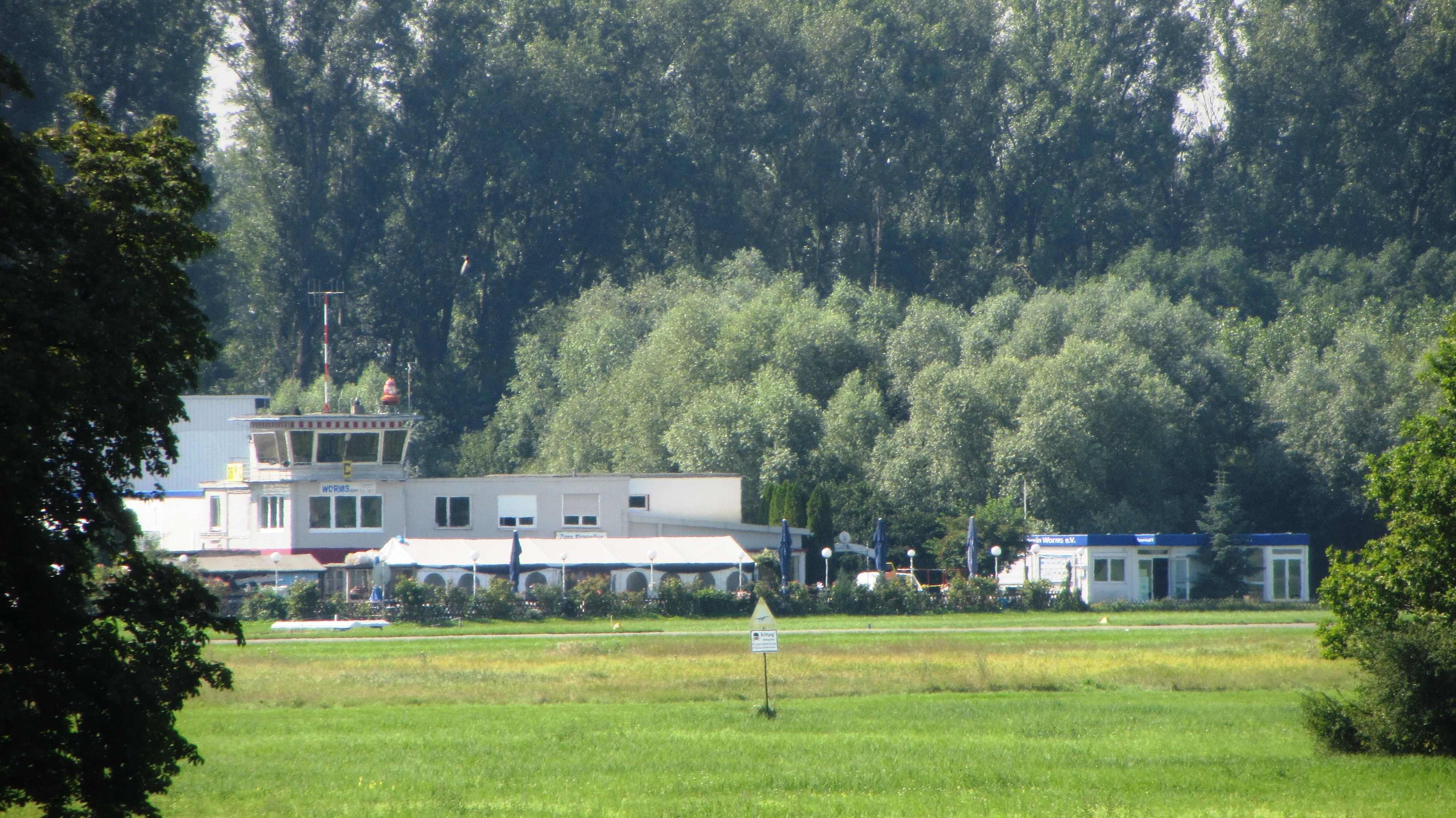 Aérodrome de Worms (Tower)